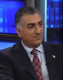 Reza Pahlavi in PARAZIT, VOA